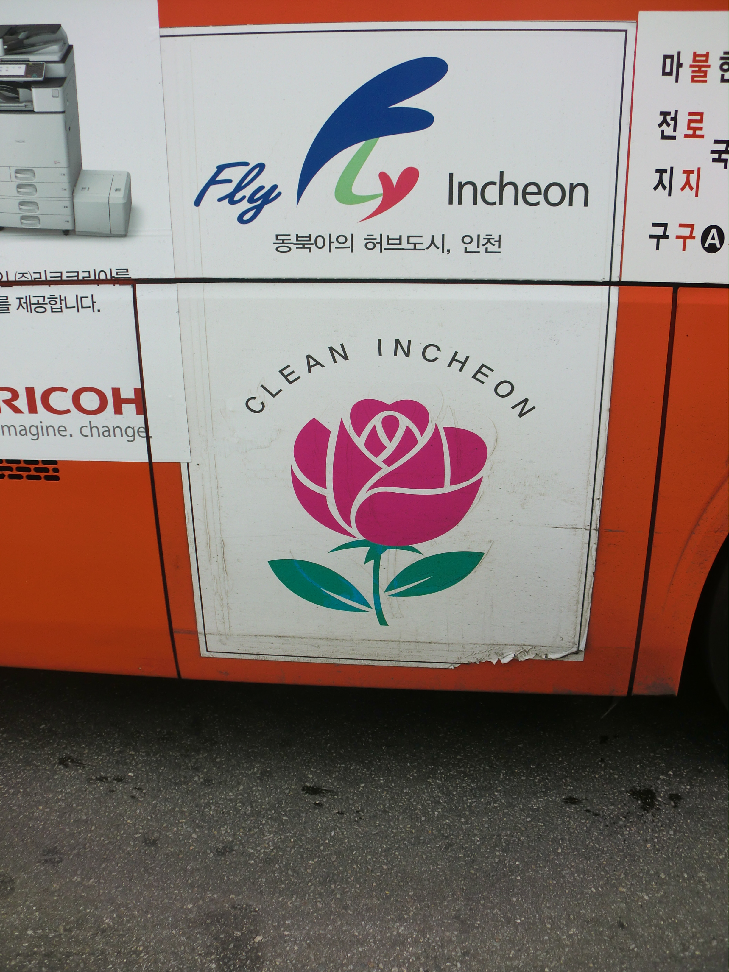 인천시내버스(인천광역시 브랜드+시의 꽃)